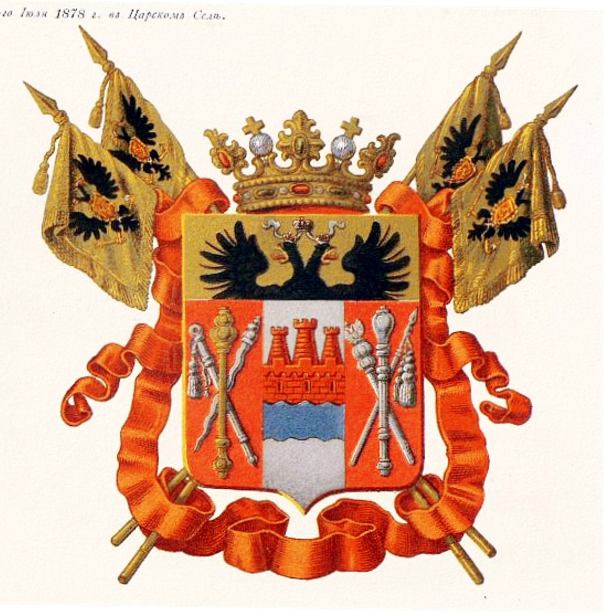 Official Russian Empire coat of arms Don Oblast. Герб Российской Империи Области Войска Донского в Гербовнике Бенке. Утверждён Императором Всероссийским Александром Вторым в 1878 году.